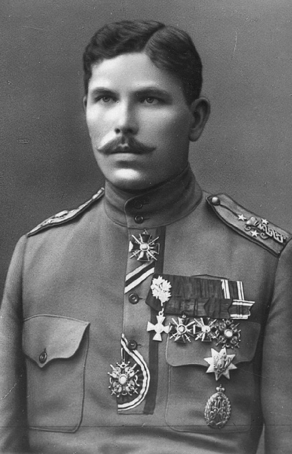 Julius Kuperjanov tsaariarmee mundris 1917. aastal